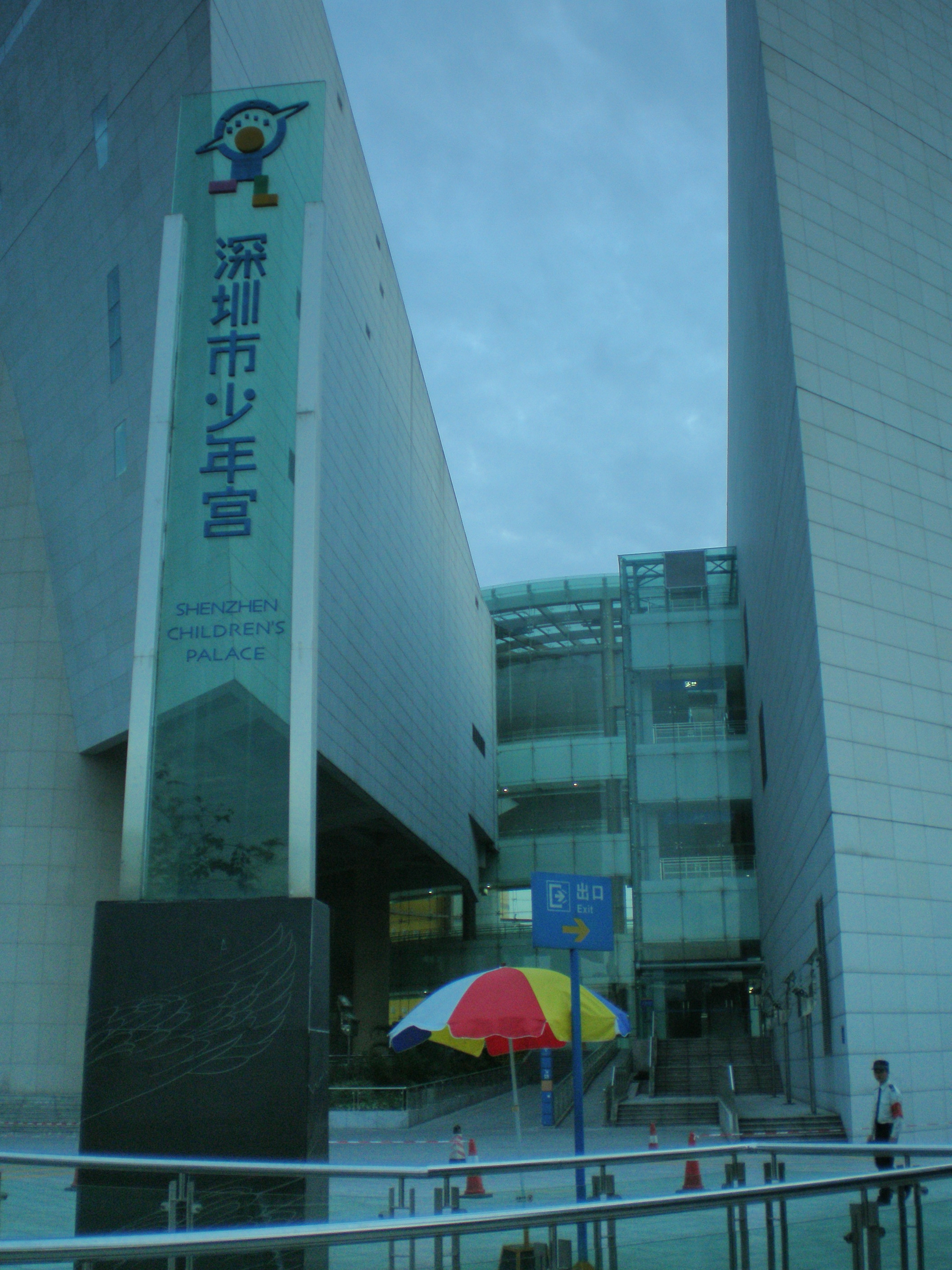 中文（中国大陆）: 深圳市少年宫